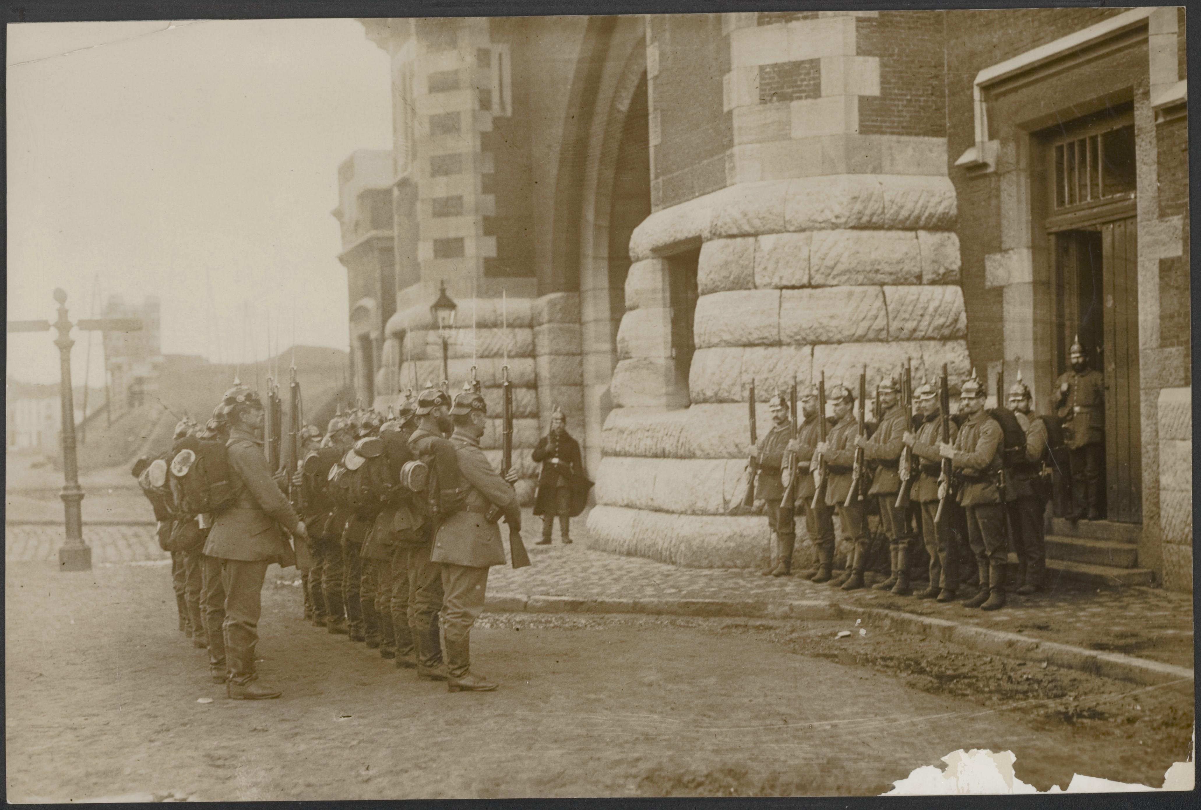 Collectie / Archief : Fotocollectie Eerste Wereldoorlog Reportage / Serie : [ onbekend ] Beschrijving : Duitse soldaten presenteren het geweer vóór de ::Torhoutsepoort|Turnhoutse poort van de vesting Antwerpen Datum : 1914 Locatie : Antwerpen, België, Duitsland, Turnhout Fotograaf : Lesch, Paul, [onbekend] Auteursrechthebbende : Public Domain logo Materiaalsoort : Foto (zwart/wit) Nummer archiefinventaris : bekijk toegang 2.24.09 Bestanddeelnummer : 158-2270